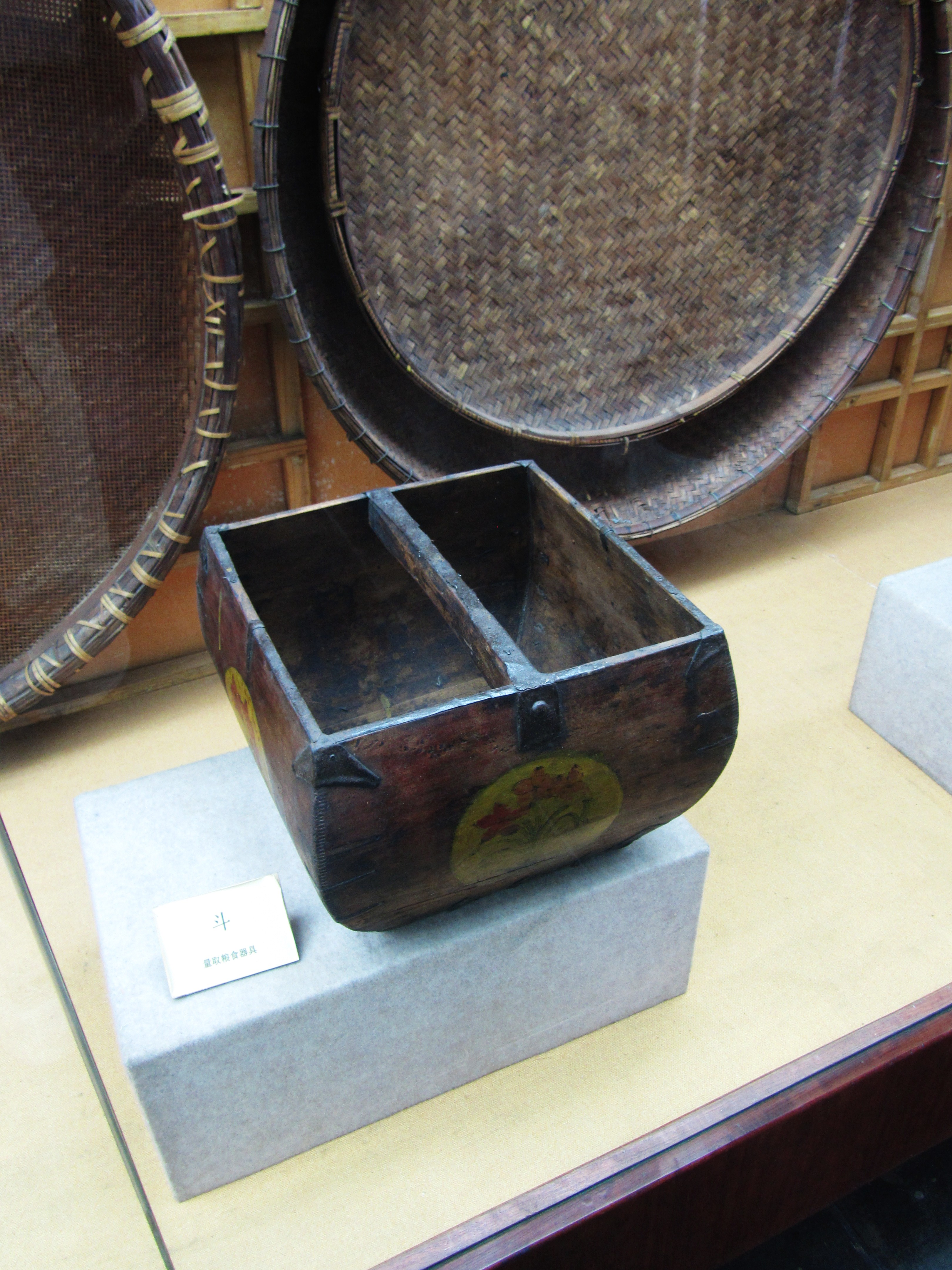 斗，李鸿章享堂江淮地区农俗陈列。